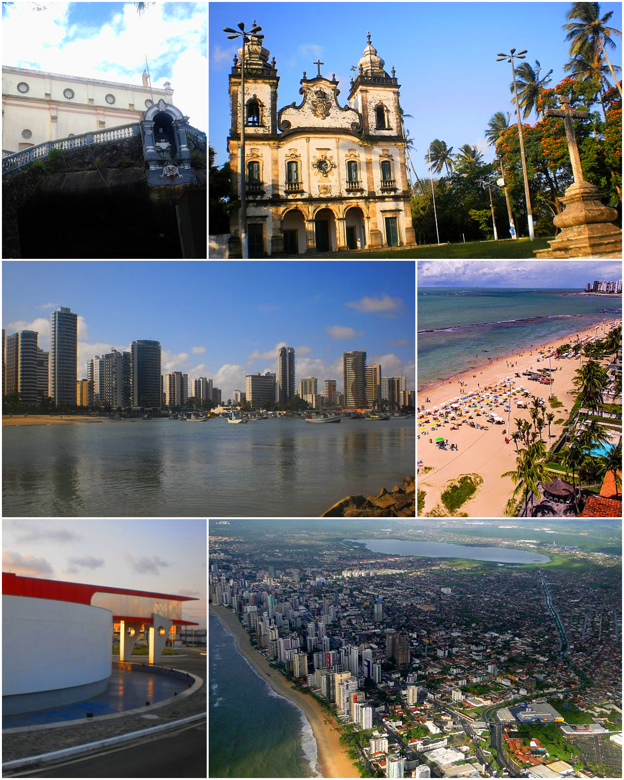 Em cima: Colônia dos Padres e a Igreja Nossa Senhora dos Prazeres; No meio: Orla de Candeias e a Orla de Piedade; Em baixo: Centro Cultural Miguel Arraes e vista Aérea da cidade